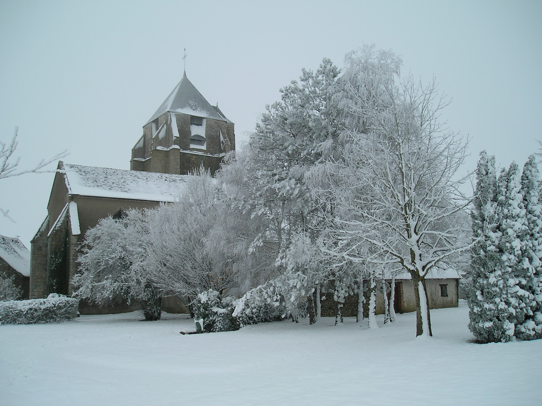 église de st léonard en beauce vue du parc du 18 juin 44